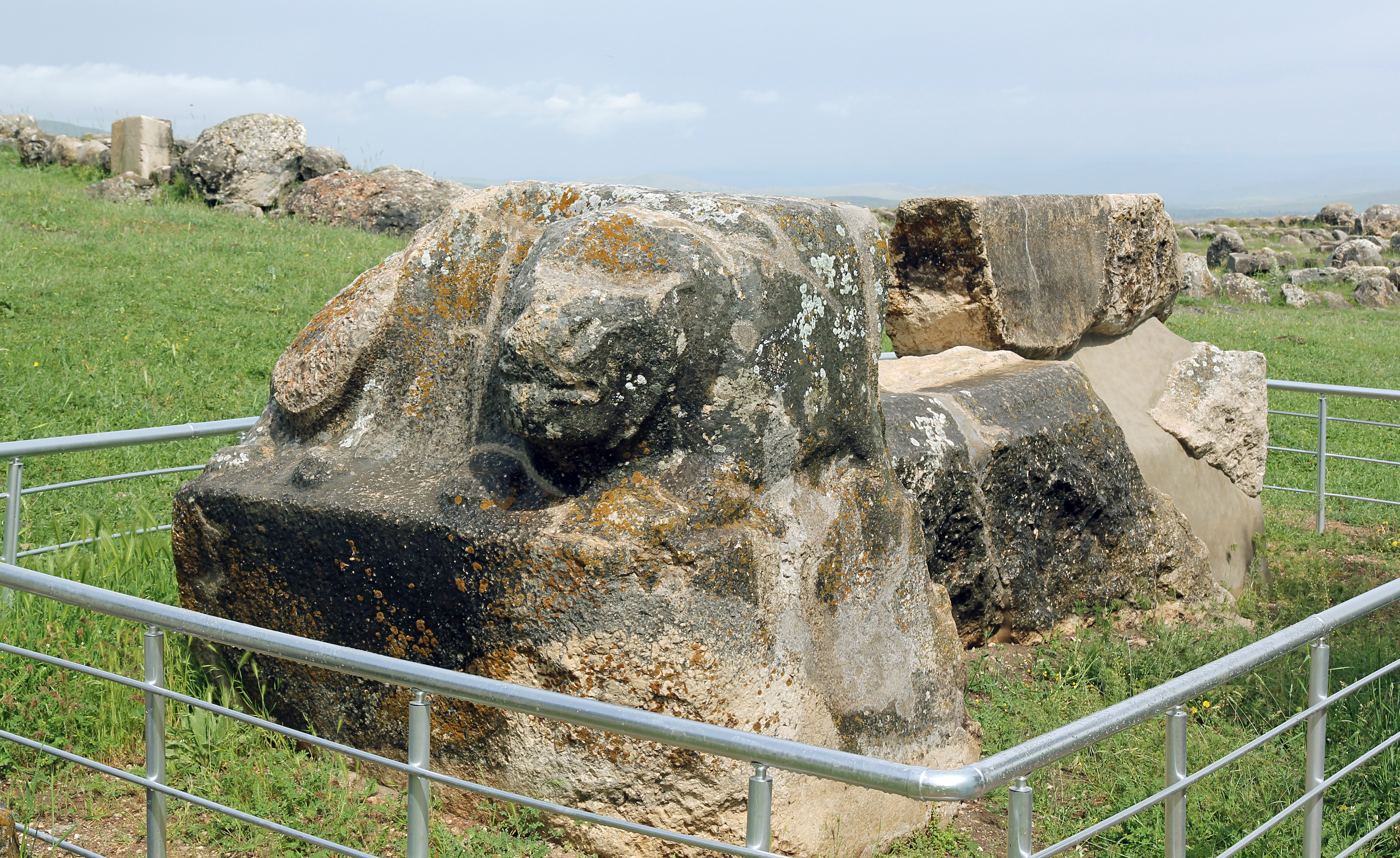 Ḫattuša, Hauptstadt der Hethiter, Löwenbecken, Südseite